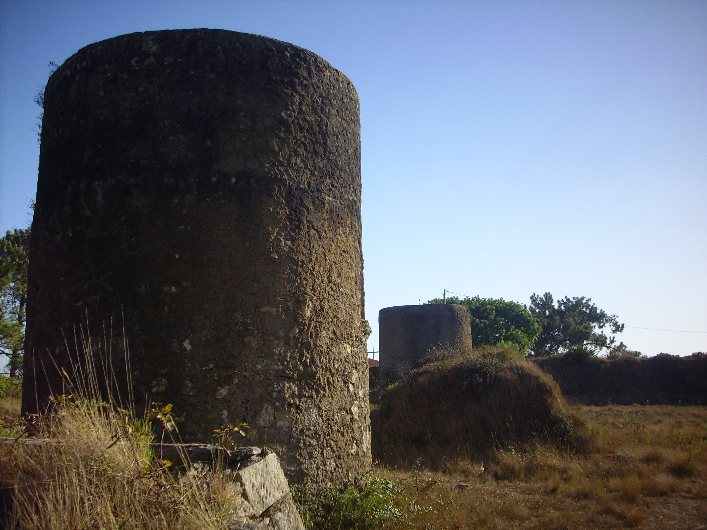 Invasões Francesas - Torres Vedras